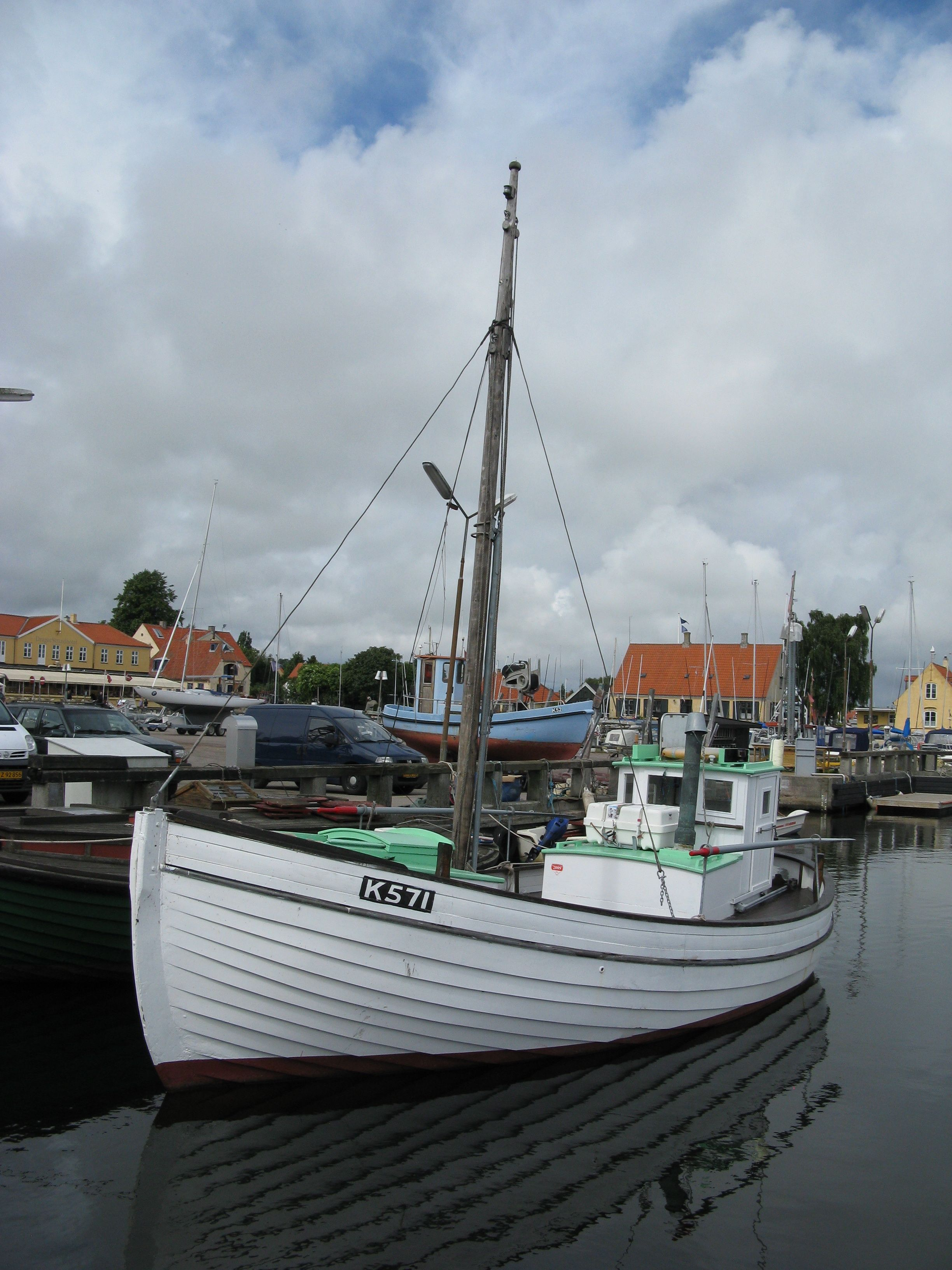 Elisabeth K571 - סירה ששימשה להברחת יהודים מדנמרק לשבדיה ולהצלתם בזמן השואה בסתיו 1943 בכפר הדייגים Dragør שבפאתי קופנהגן, במקום מוזיאון מקומי ובו תעוד.